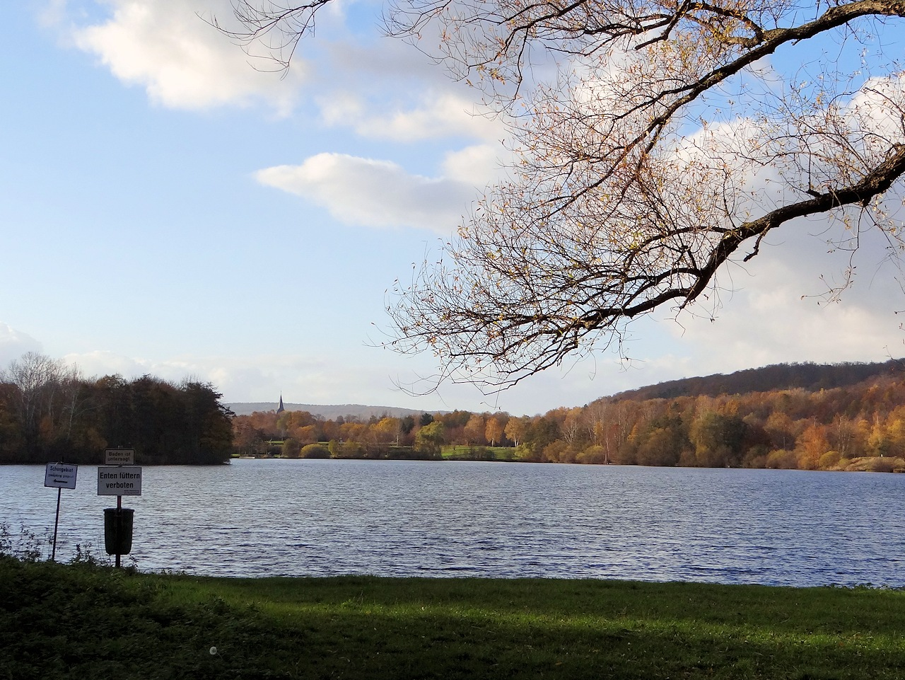 Vienenburger See mit Blick nach Westen mit der Kichturmspitze des Klosters Wöltingerode